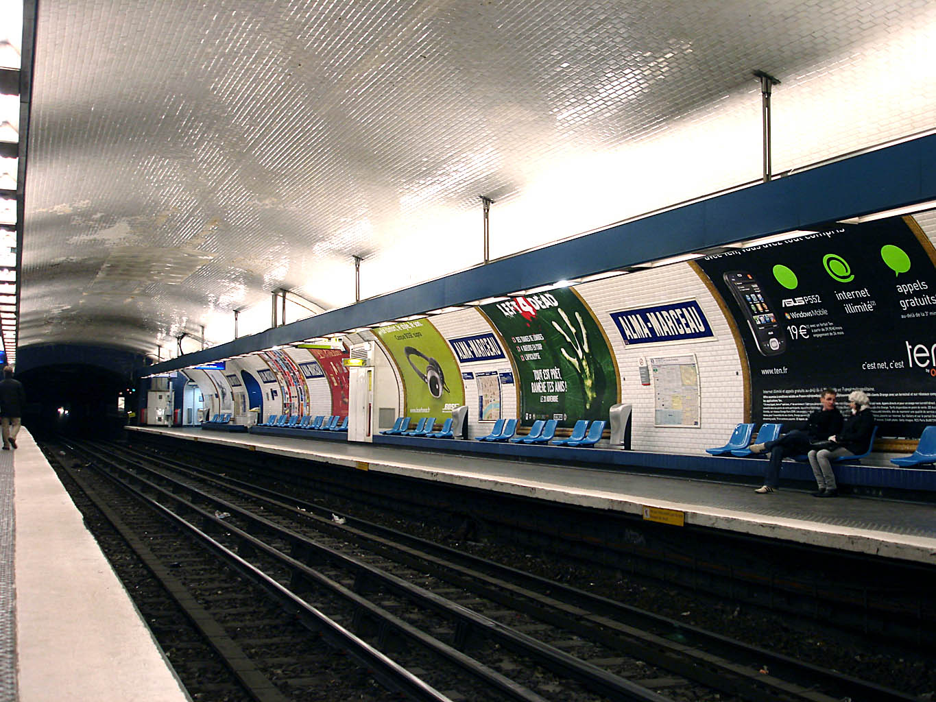 Station Alma - Marceau de la ligne 9 du métro de Paris, France.